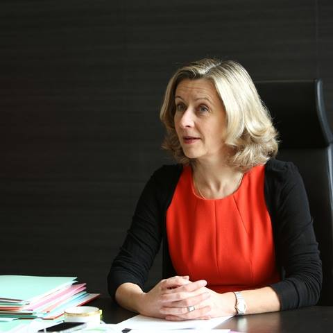 Hélène Conway-Mouret - Ministre déléguée chargée des Français de l'étranger - Convention